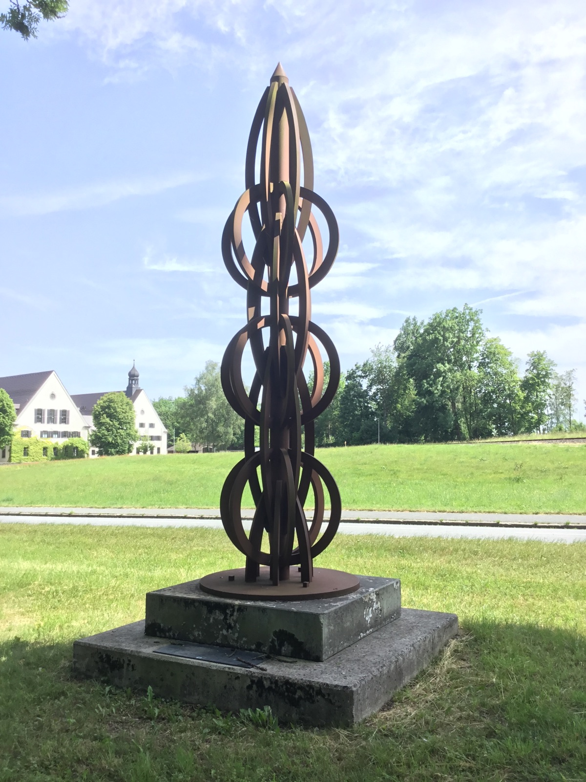 Skulptur "Wegezeichen" (2011) von Manfred Bergmeister. Corten-Stahl. Standort: Wasserburger Straße, 85560 Ebersberg / Oberbayern